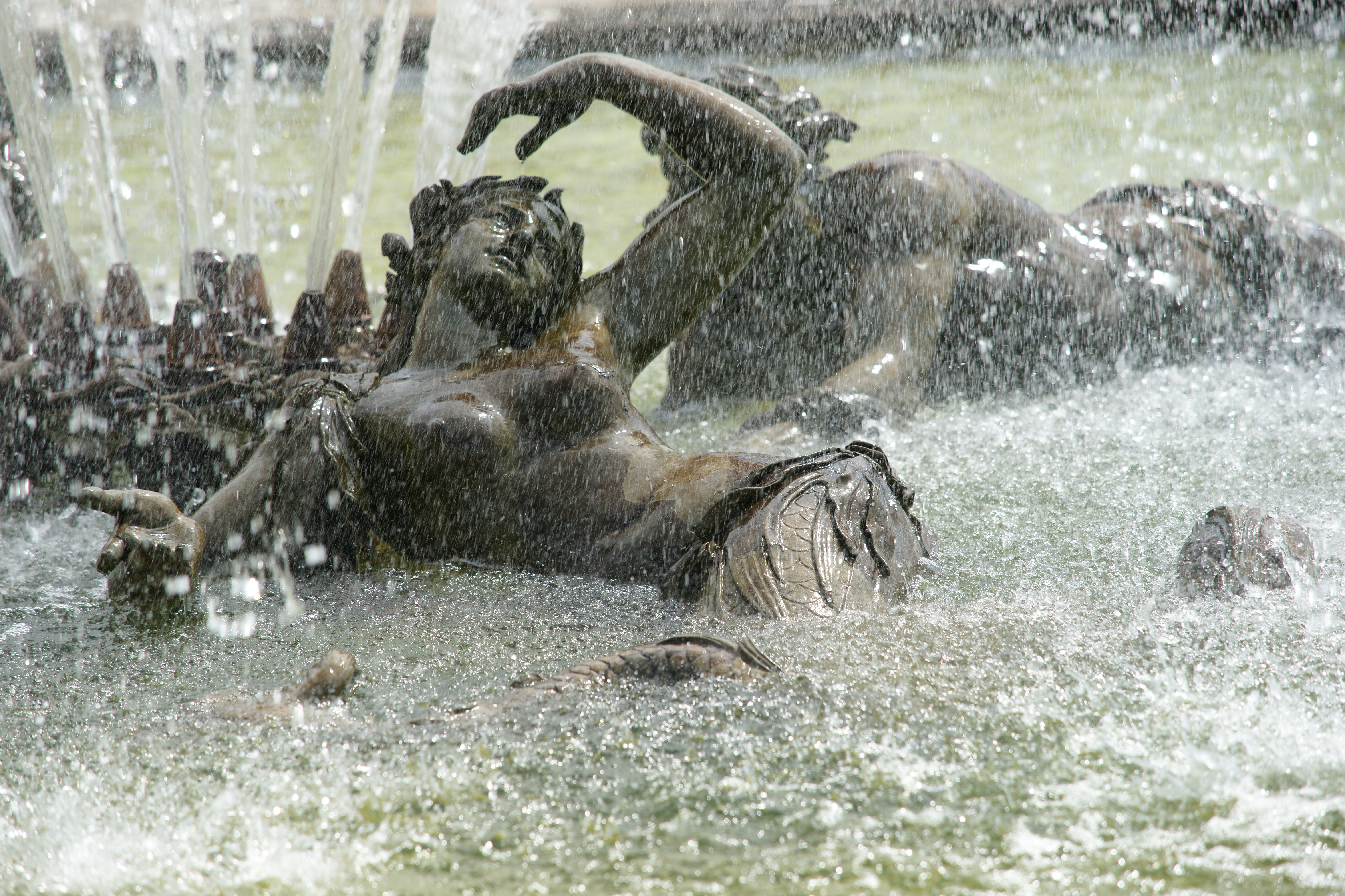 Bassin Est des couronnes, sculptures en plomb par Tuby (1699) - Parc de Versailles, parterre du Nord.